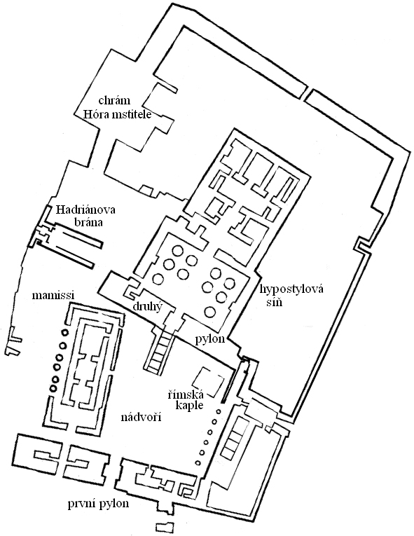 Mapa Esetina chrámu na ostrově Philae